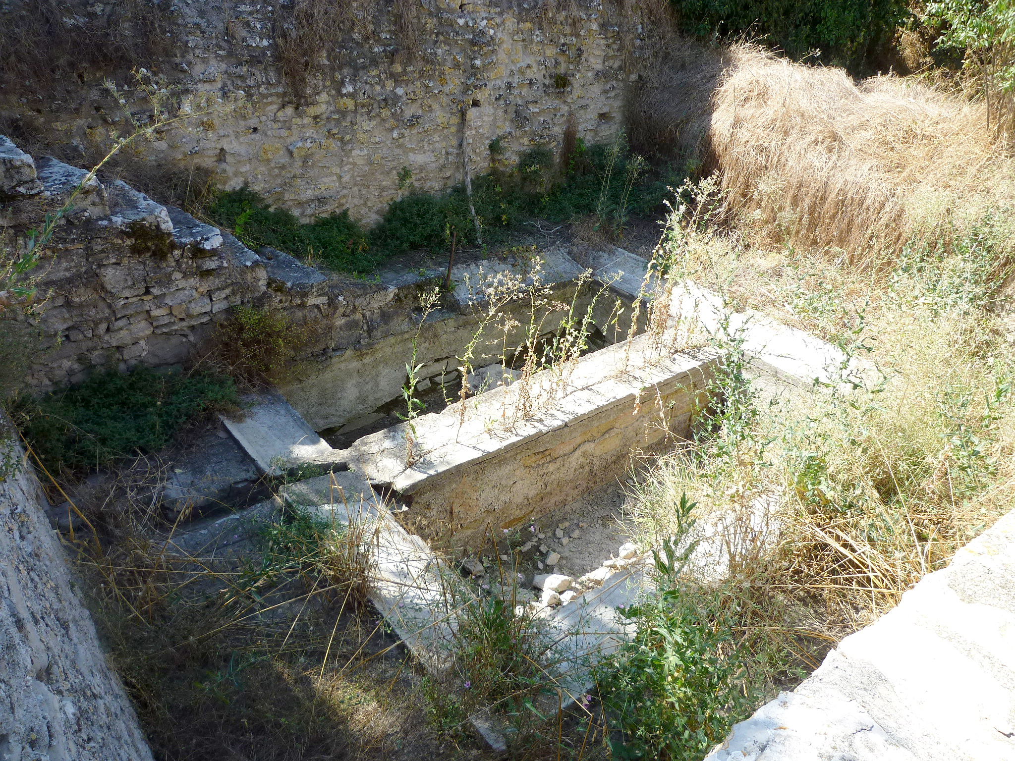 Font de Gospí (Sant Ramon): rentadors